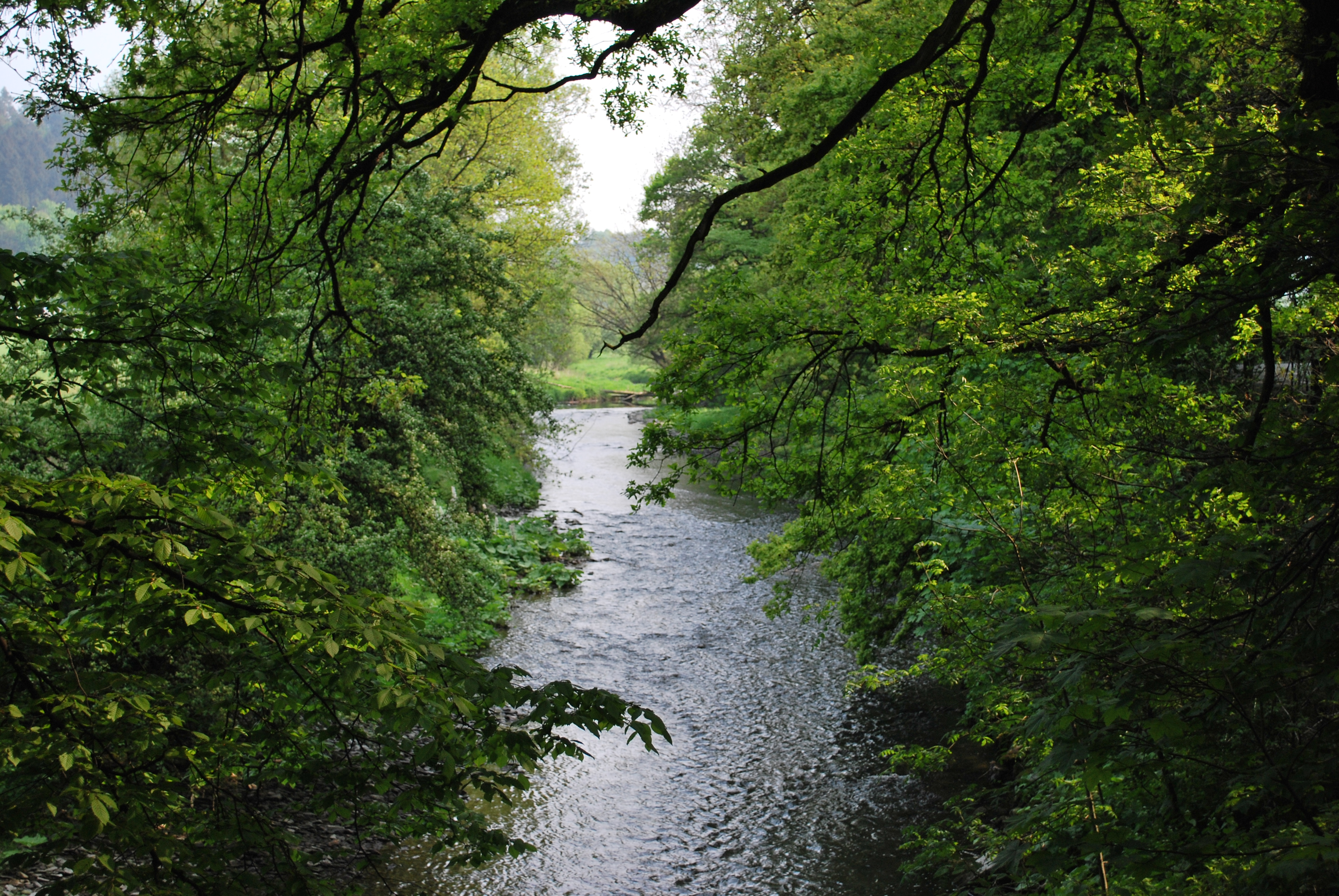 Fluss zur Ruhr, die Röhr bei Hüsten